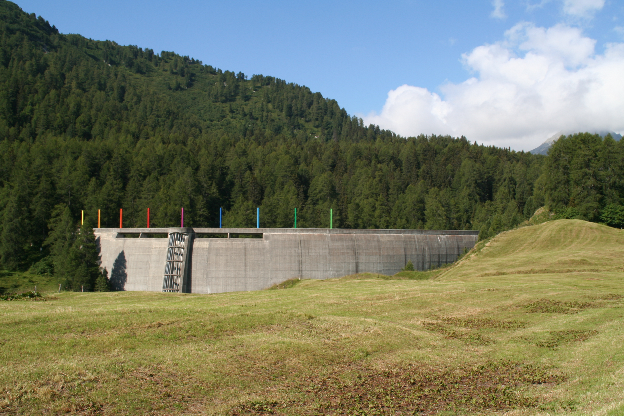 Culurs